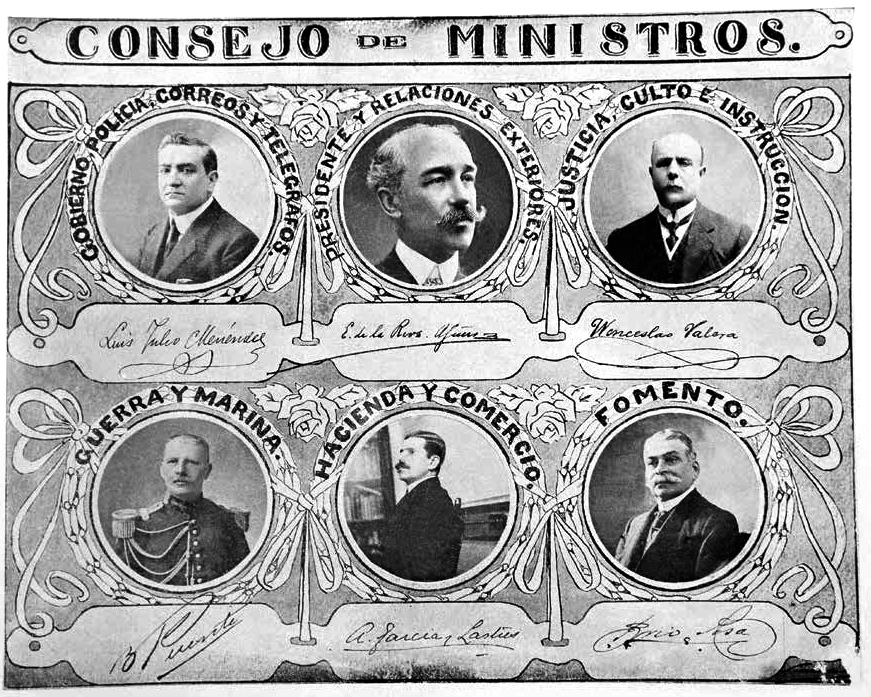 Alegoría del primer gabinete ministerial del segundo gobierno de José Pardo (1915), presidido por Enrique de la Riva Agüero. Aparecido en la Revista "Lima Gráfico", 1915.